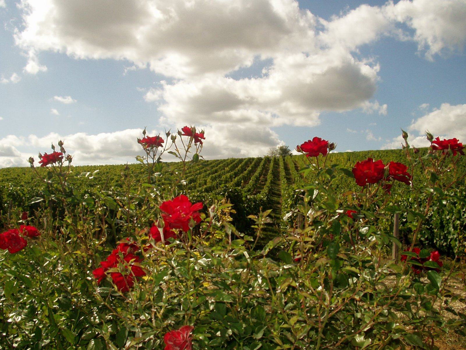 Sancerre vineyard.